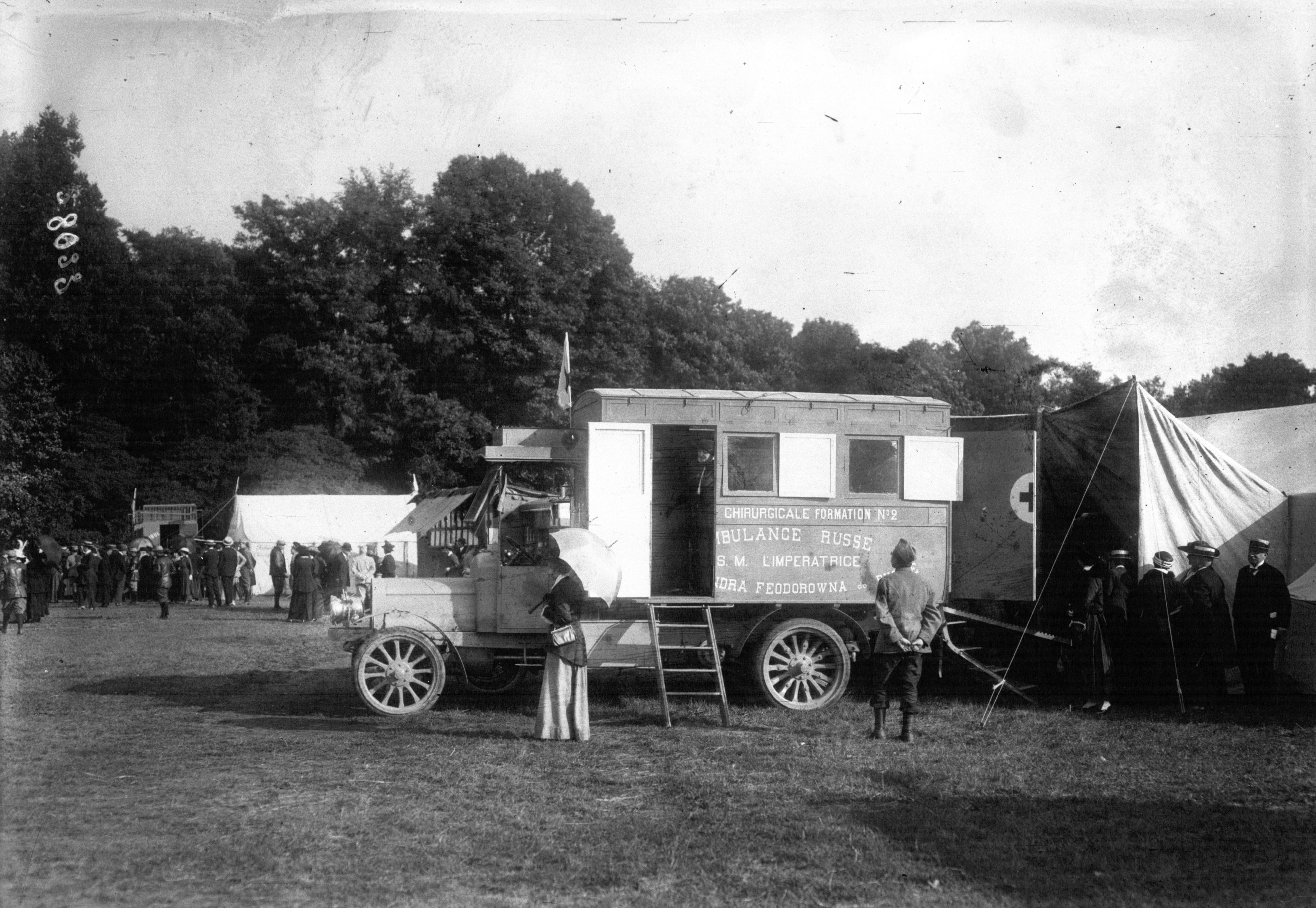 Bagatelle, ambulance russe : voiture chirurgicale : [photographie de presse] / Agence Meurisse